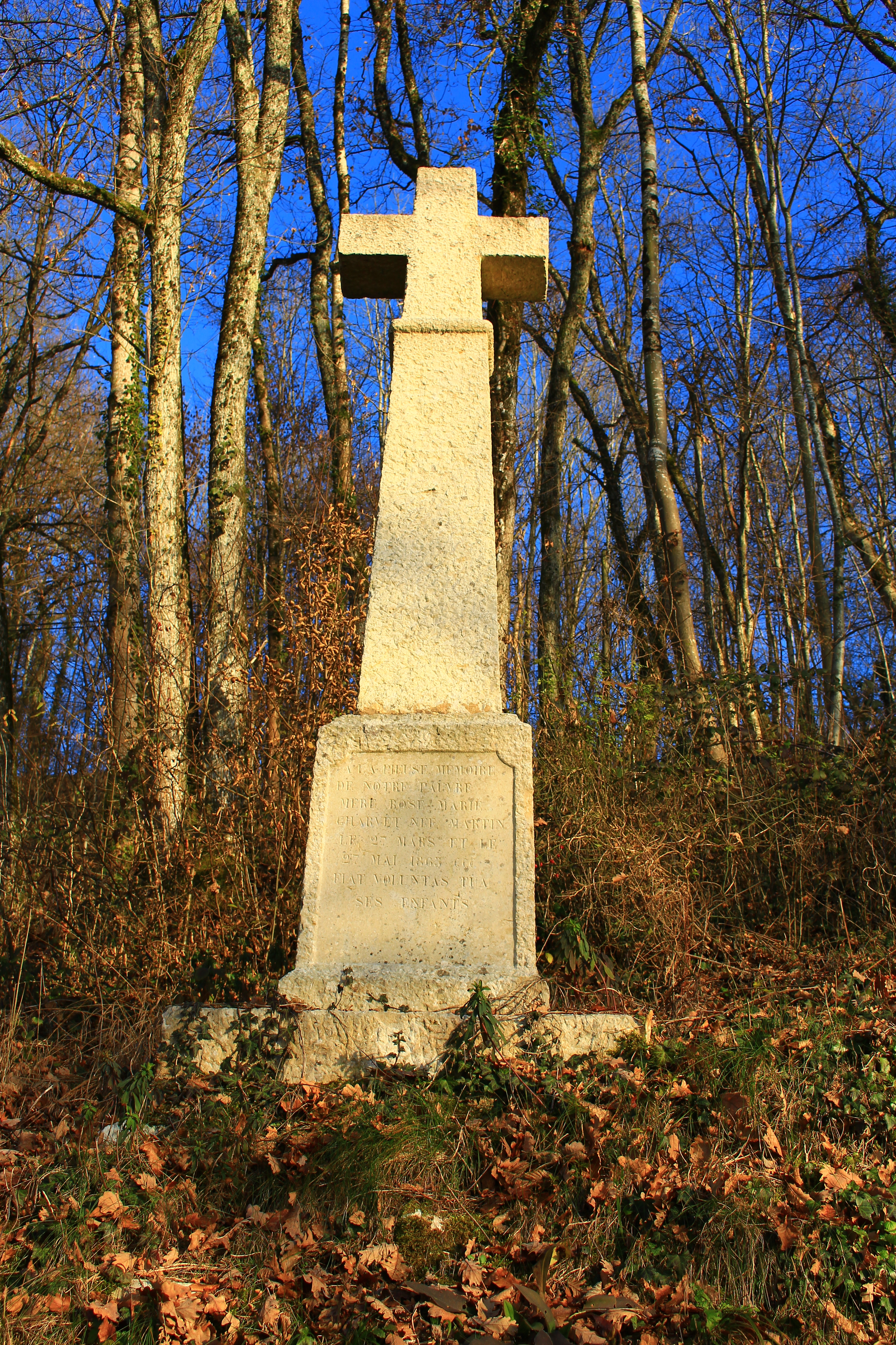 La Croix Charvet, rendant hommage à Marie-Rose Martin, veuve Charvet, assassinée en ces lieux le 27 mars 1865. La croix fut érigée en 1866. Saint-Franc, Savoie, France. Décembre 2016